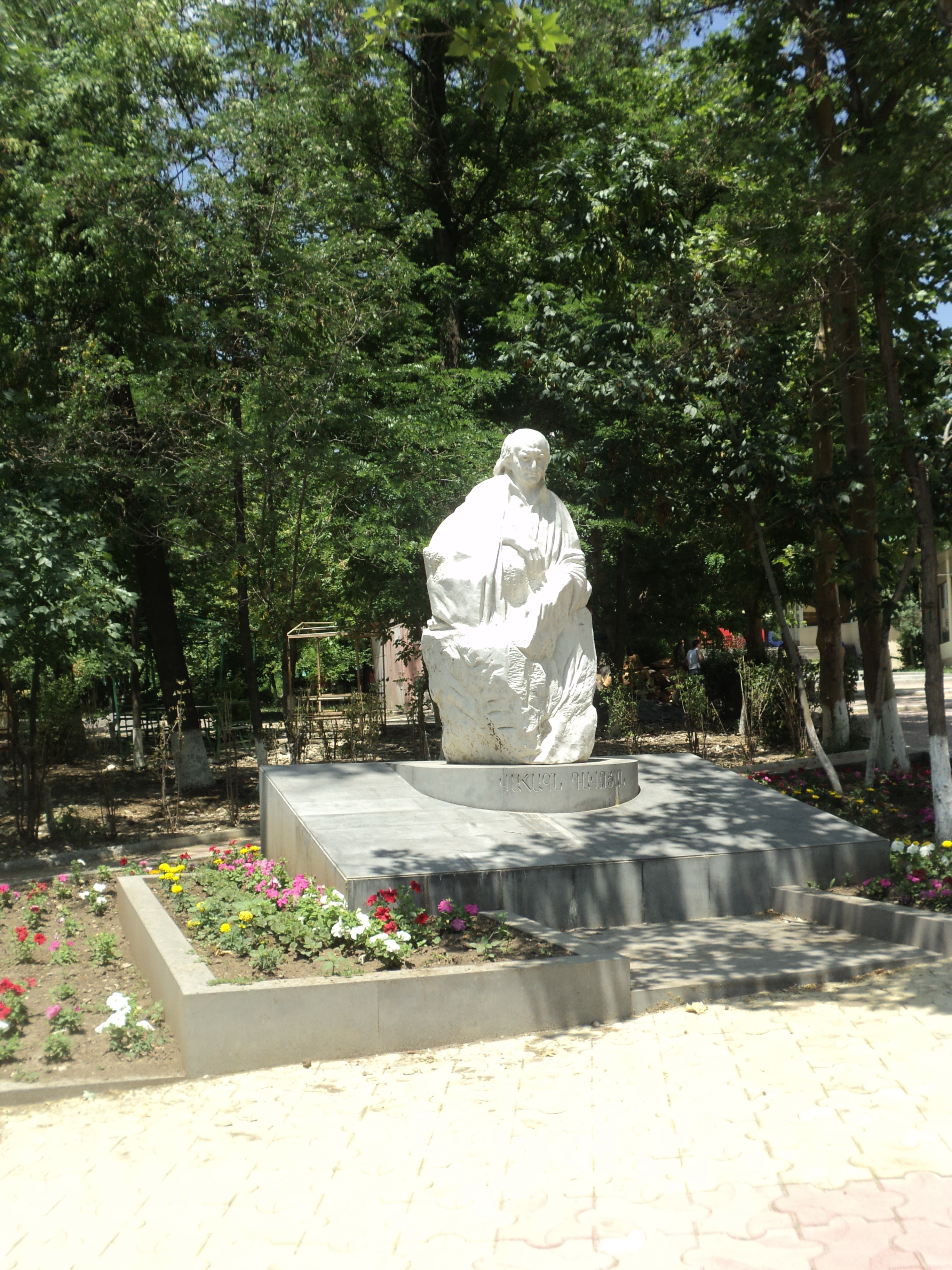 Վահագն Դավթյան Հեղինակ` Լևոն Թոքմաջյան: 2010 Գտնվում է Կոմիտասի պողոտայի և Նաիրի Զարյան փողոցի միջև ընկած զբոսայգում: 3/7